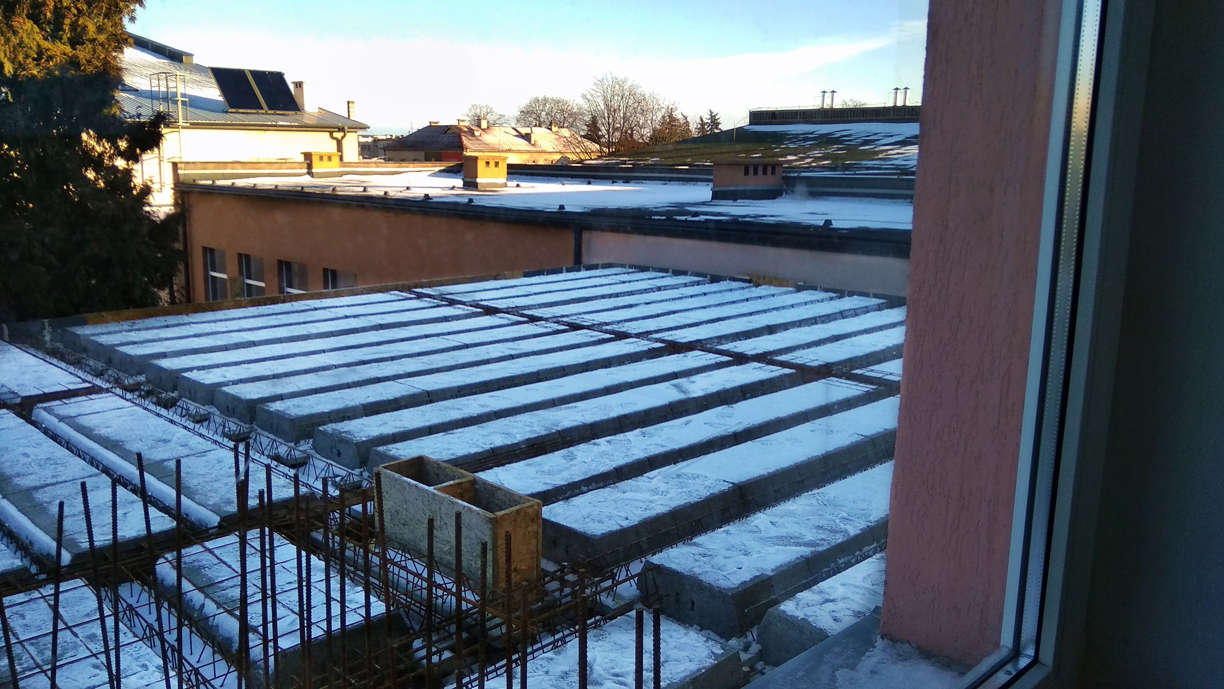 LO w Makowie Maz – część placu budowy, 3.01.2019